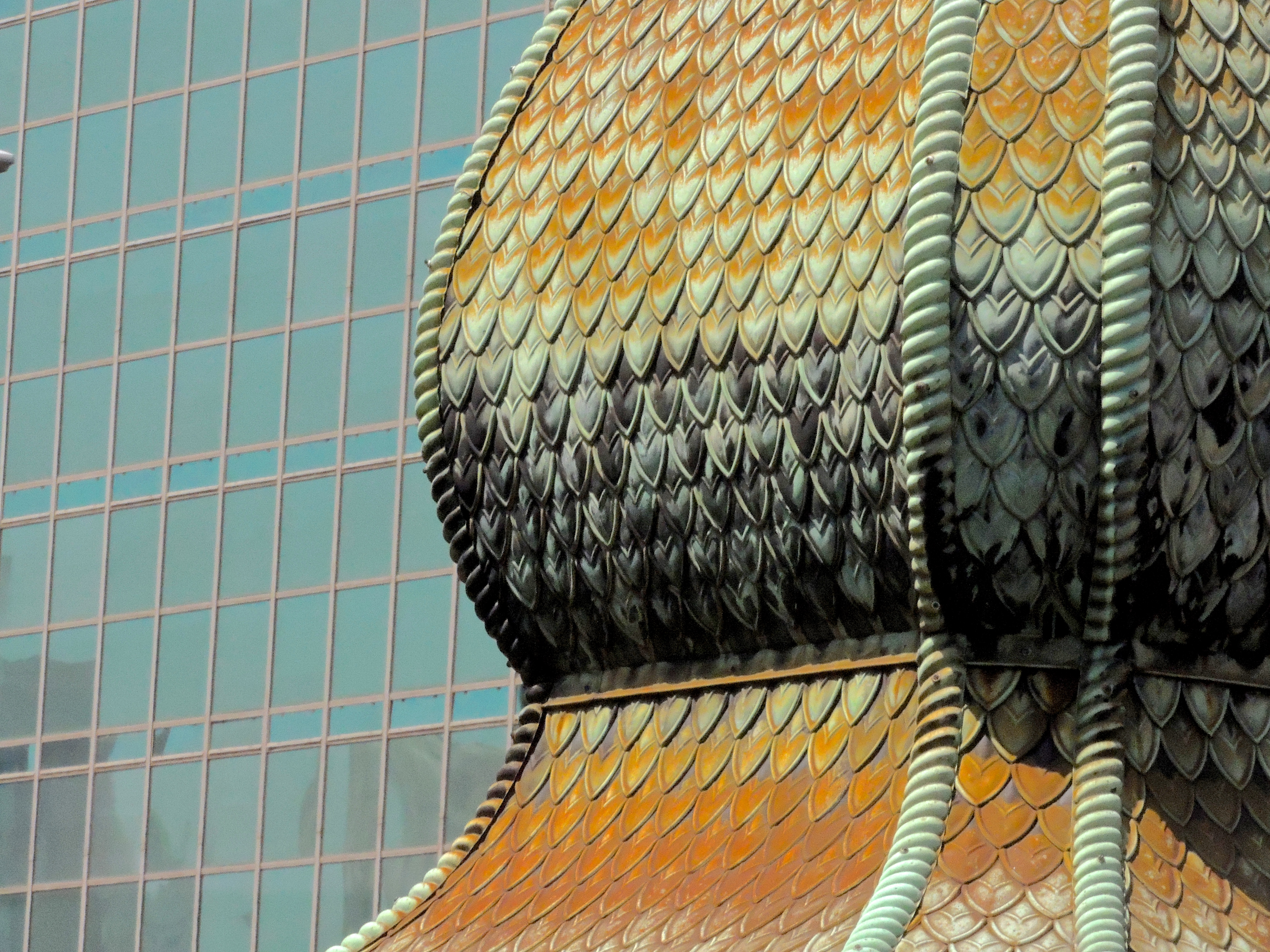 Detalhe da cúpula da torre da residência Joaquim Franco de Melo, na avenida Paulista, São Paulo (SP), Brasil.